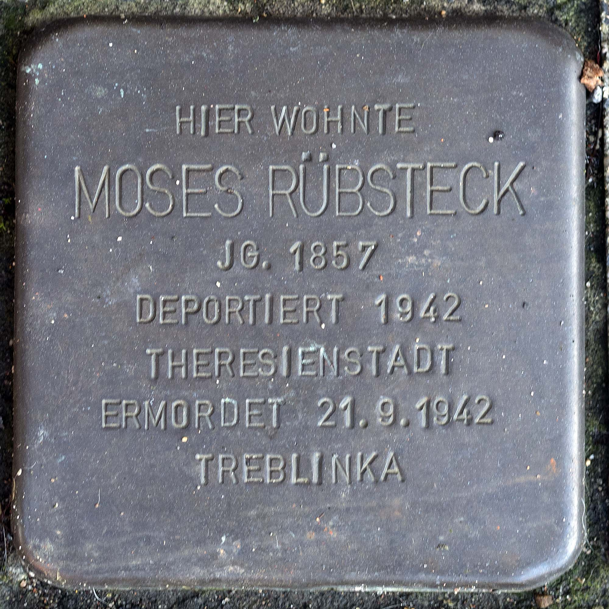 Stolperstein für Ruebsteck Moses